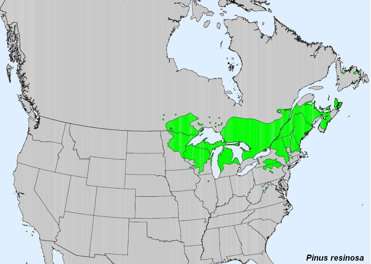 Range map of Red pine (Pinus resinosa)